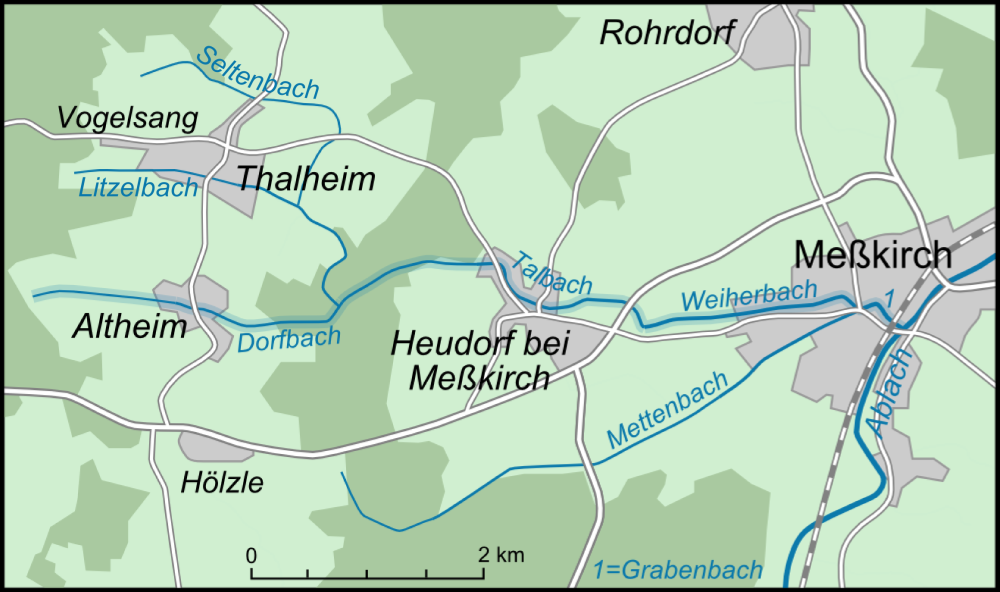 Verlaufskarte des Grabenbaches mit seinen unterschiedlichen Bezeichnungen im Verlauf